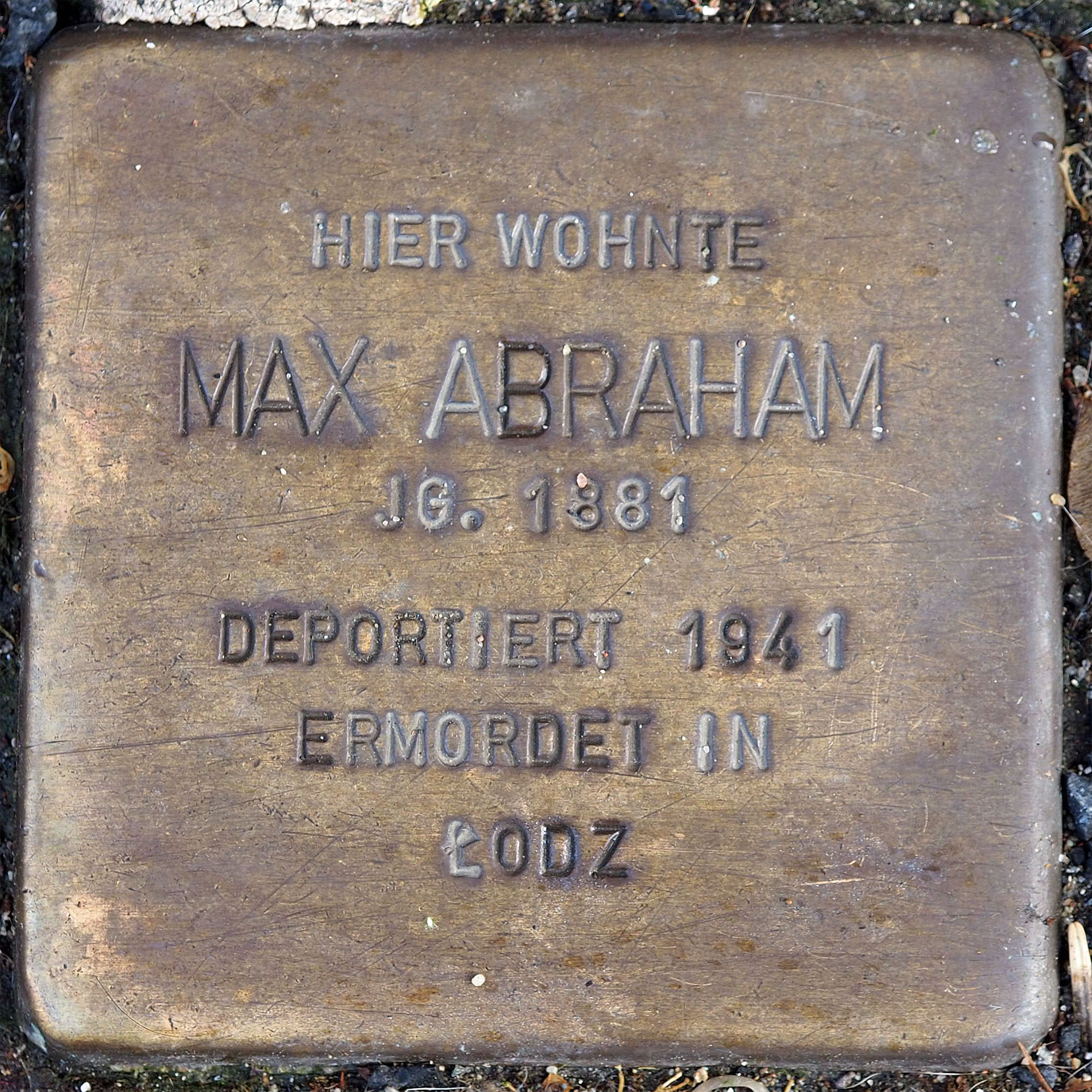 Stolpersteine MG: Abraham, Max